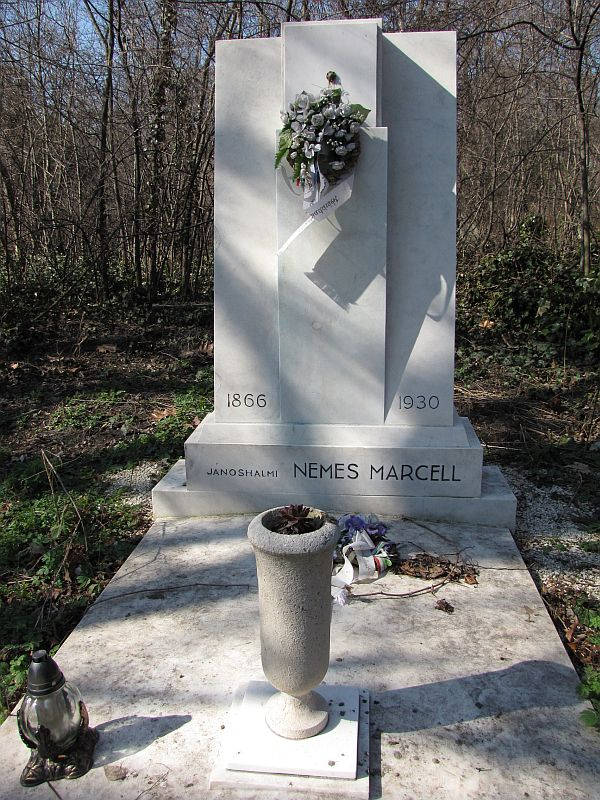 Nemes Marcell (Jánoshalma, 1866 – Bp. 1930. okt. 28.) műgyűjtő sírja Budapesten. Kerepesi temető: 56-1-56.